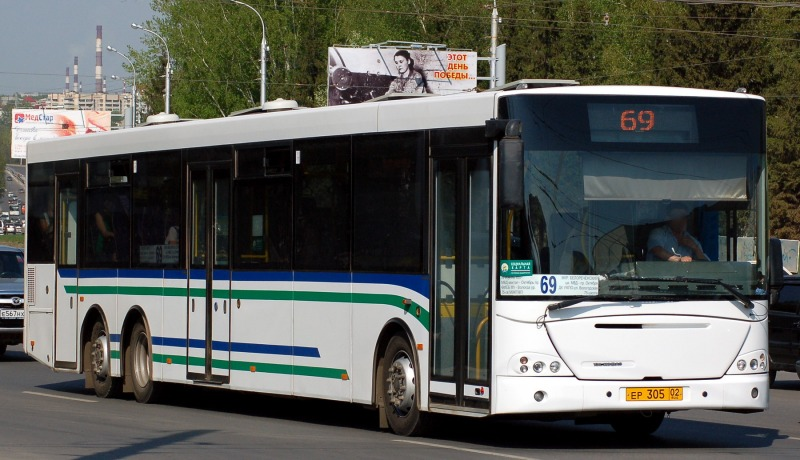 Автобус НефАЗ-VDL "Башавтотранс" на улицах г.Уфы.